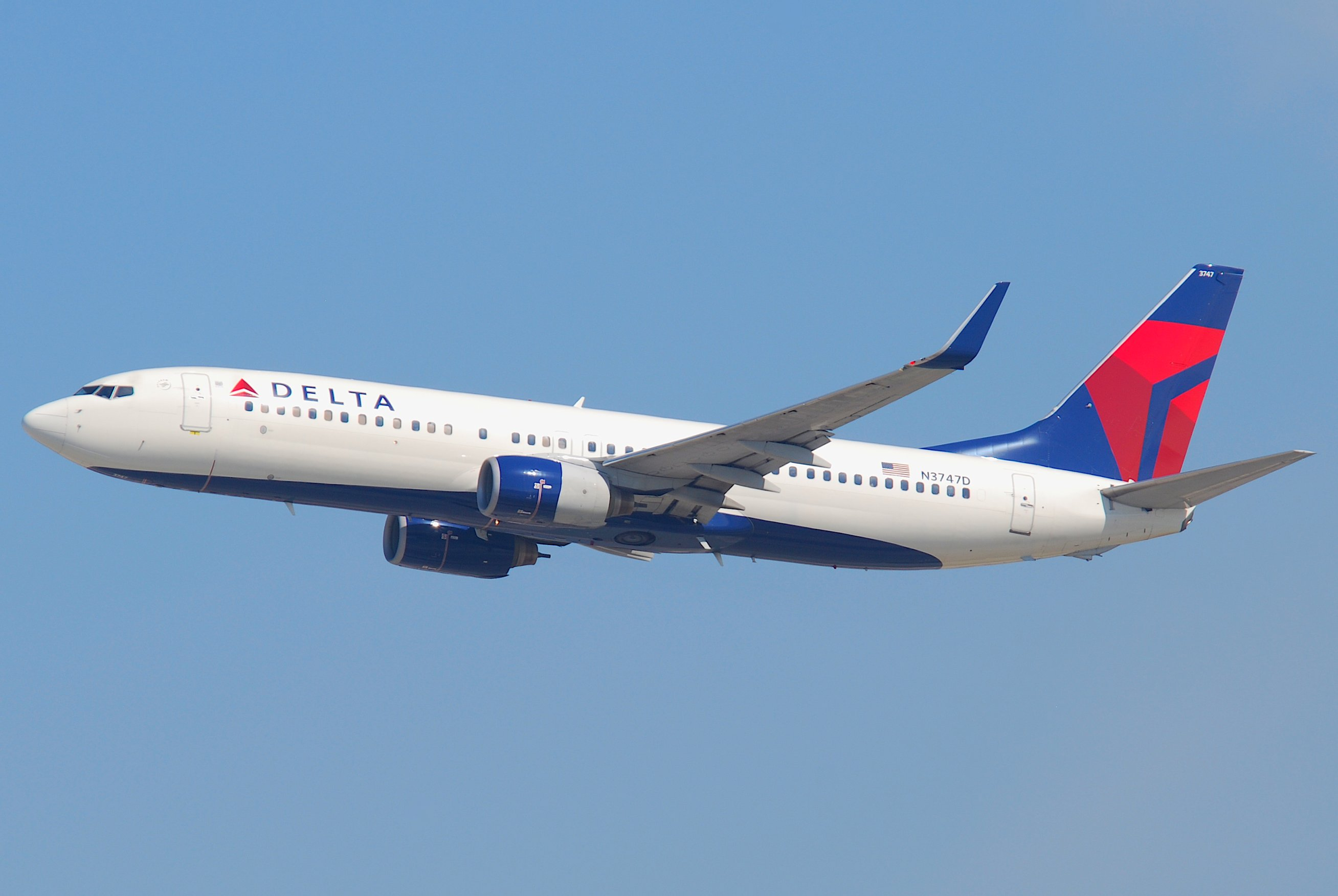 Delta Air Lines Boeing 737-800; N3747D@LAX;10.10.2011/622in